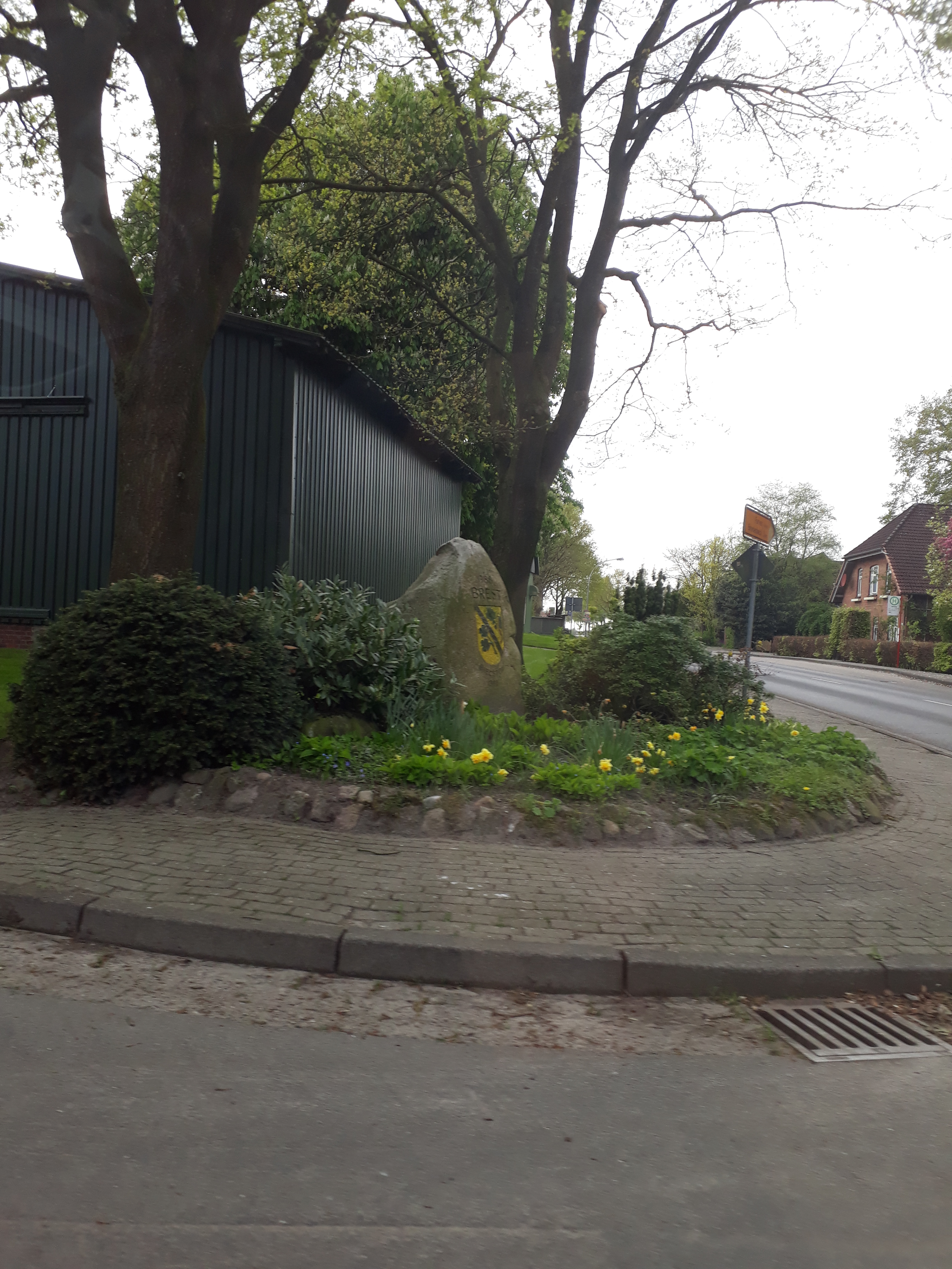 Findling mit Brester Wappen in Brest, Landkreis Stade (Nds.)